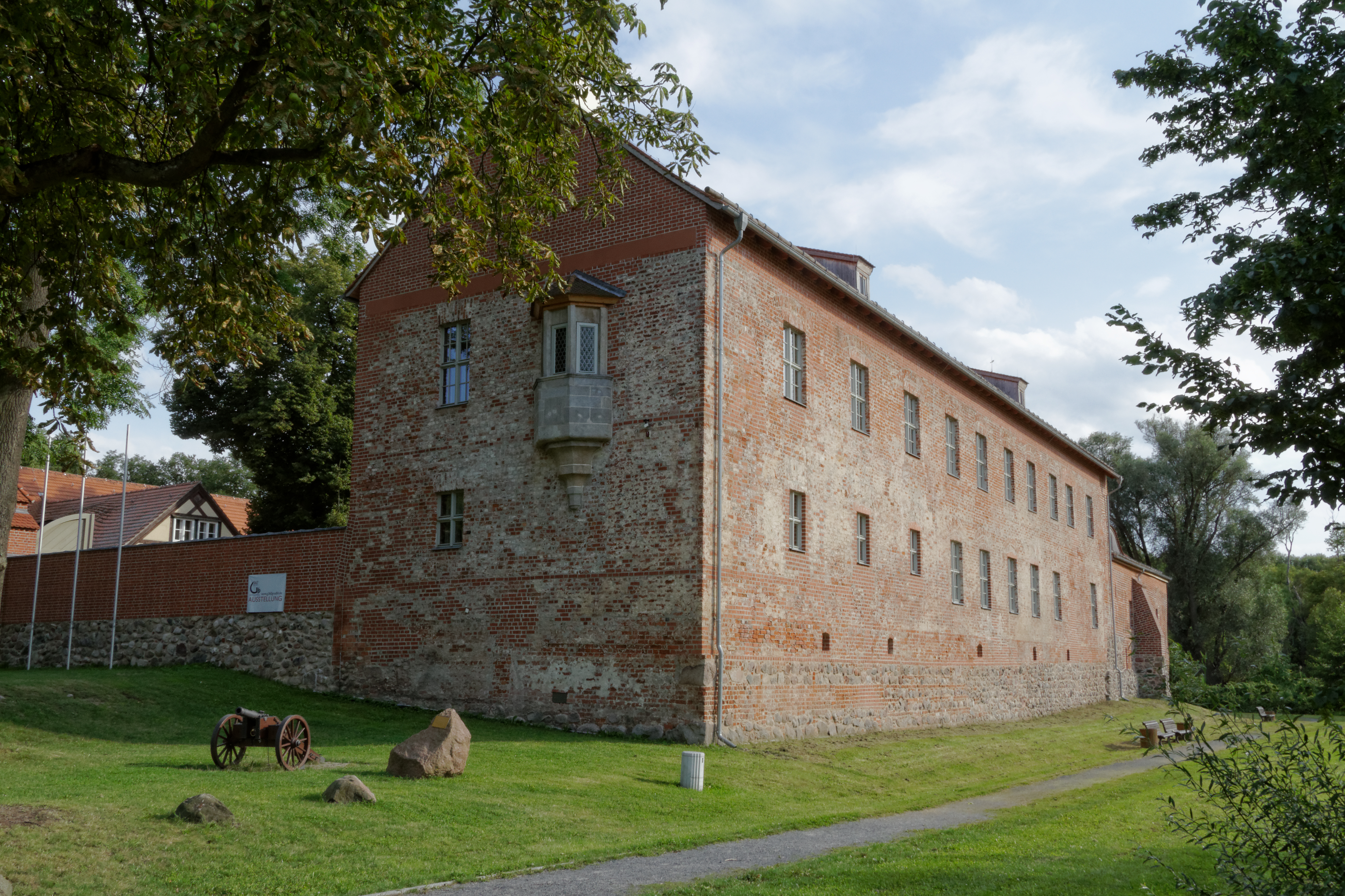 Burg Storkow, restaurierter Palas.